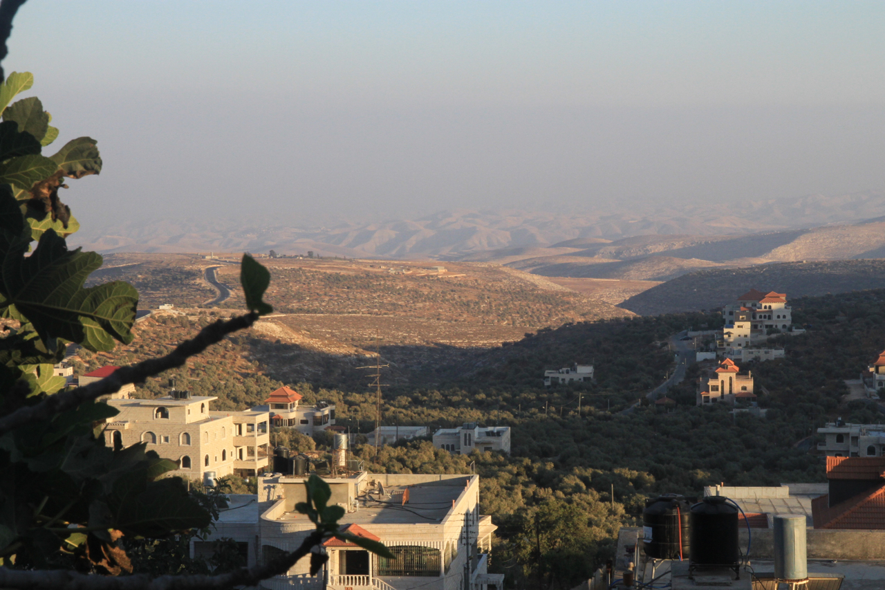 Taybeh, Palästina.